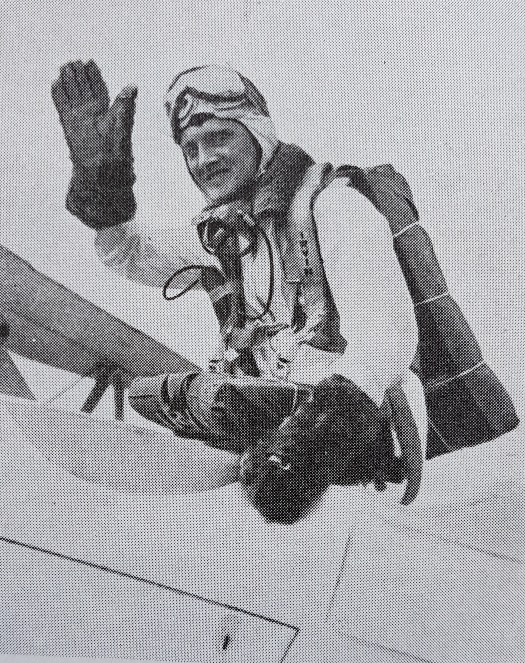 John Tranum dansk luftakrobat